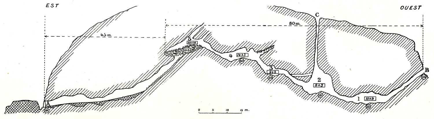 Coupe longitudinale de la Grande Caverne d'Engihoul avec gisement en 5 d'Ursus speleus, fouillé par M. le professeur J. Fraipont. A - Entrée orientale à la base de la muraille rocheuse du ravin d'Engihoul, à 13 m au-dessus de la Meuse. Le sol de ce passage a modifié B - Entrée occidentale formée de deux couloirs dont l'un était fermé par le magasin à poudre de la carrière, en 1910. C - Sommet de cheminée. 1 - Salle la plus basse (10 m plus bas que l'entrée), de 10 m L x 9 m l. 2 - Salle de la Lune de 8 m L x 3 m l. Son nom lui a été donné par M. Doudou en raison de l'effet lumineux donné par le sommet de la cheminée de la diaclase qui débouche au sommet du massif. 3 - Salle des Nutons, 4 m L x 3 m l, avec la Galerie des Stalactites, couloir ascendant vers l'ouest totalement obstrué par les concrétions. 4 - Salle du Cône, 14 m L x 3 m l, ainsi nommé par le cône régulier formé au plafond par la masse rocheuse. 5 - Grande salle, 20 m L x 18 m l x 3 à 4 m h, avec deux cheminées obliques à l'aplomb desquelles se trouvent la plus grande épaisseur de dépôts meubles contenant des ossements (probable charnier d'une soixantaine d'ours et d'une cinquantaine de sangliers, formé par la pénétration des eaux de surface qui ont périodiquement submergé les cavités souterraines).